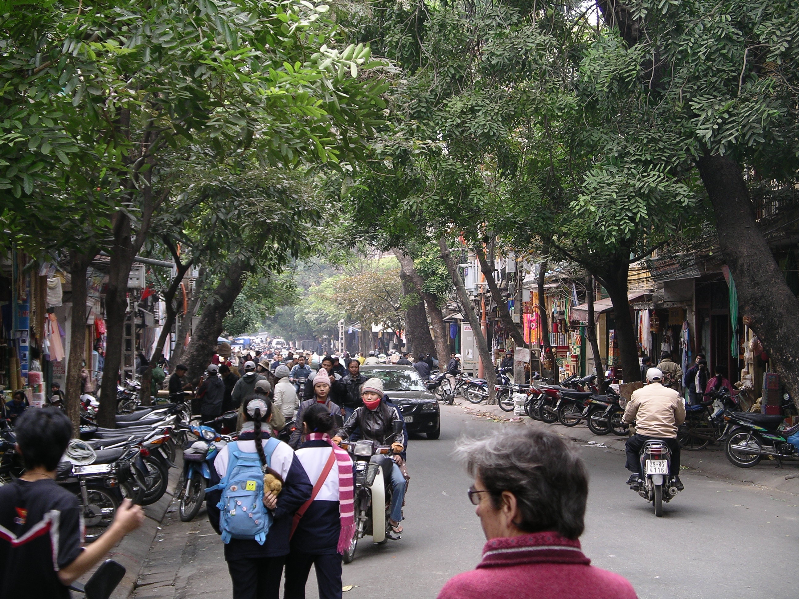 C'est bruyant et ça pue les gaz d'échappement mais c'est beau